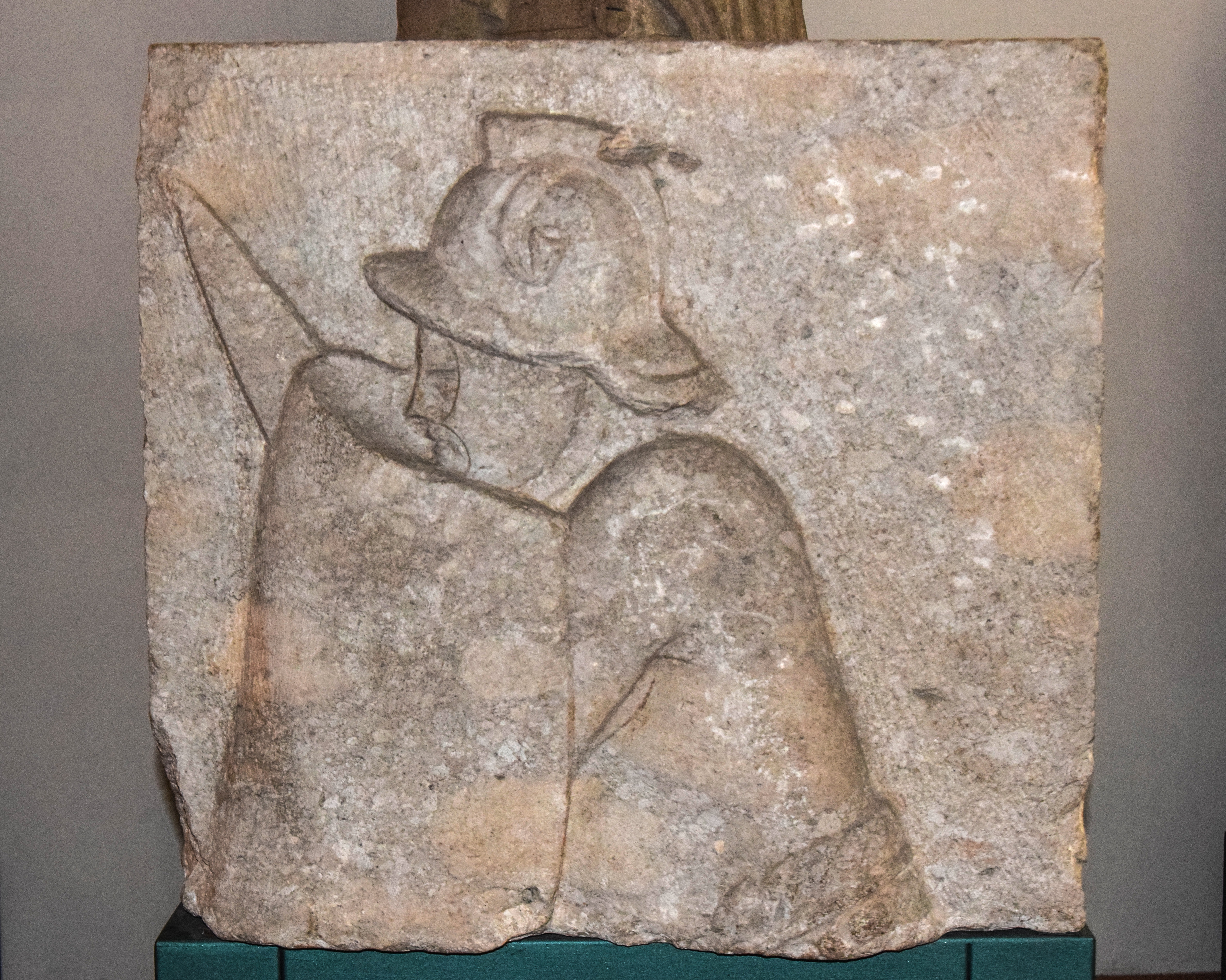 Un rilievo di gladiatore del I secolo d.C. da Benevento. Si suppone che provenga dall'anfiteatro romano. Attualmente custodito nel Museo del Sannio